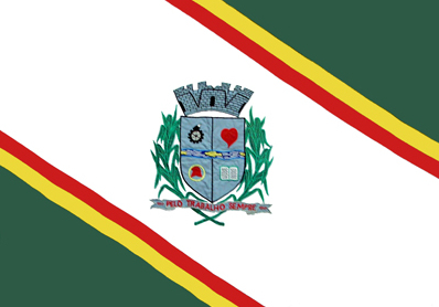 Bandeira oficial da cidade de Rafard - São Paulo, Brasil.